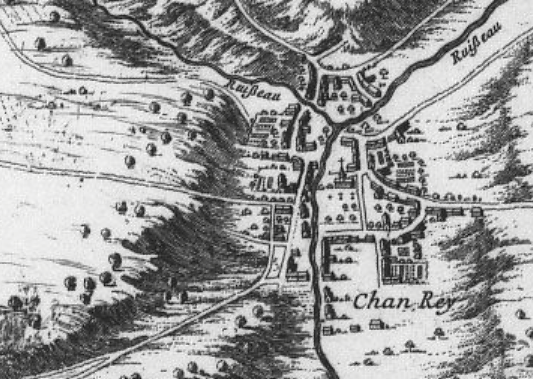 Extrait centré sur le village de Xanrey de Plan des villes de Vic Moyenvic et Marsal en Lorraine avec leurs nouvelles fortifications comme elles sont à present / par le Sr Beaulieu